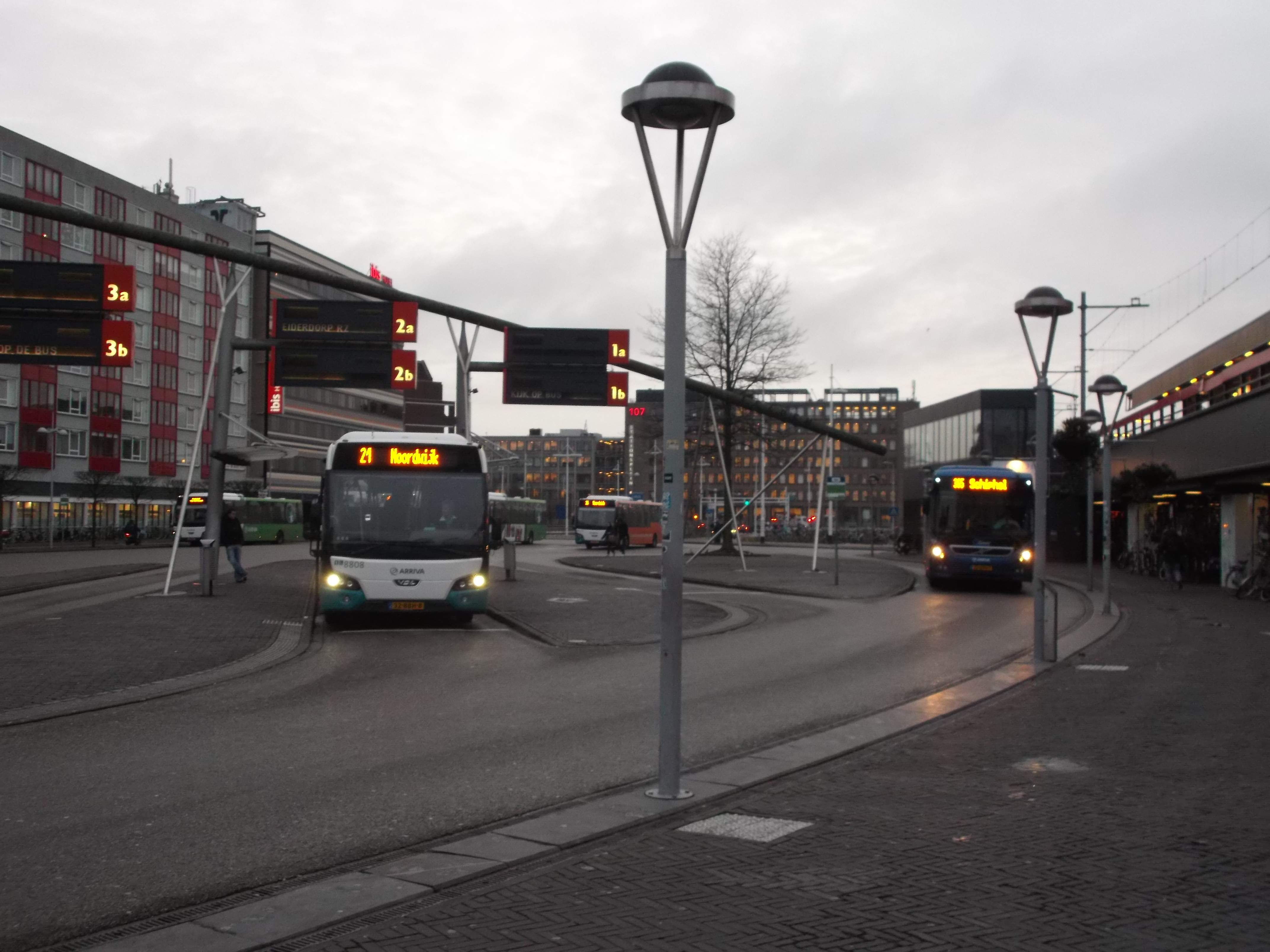 Bus 21, Leiden - Noordwijk, op station Leiden Centraal. De bus rijdt via de kern Rijnsburg (Gemeente Katwijk).